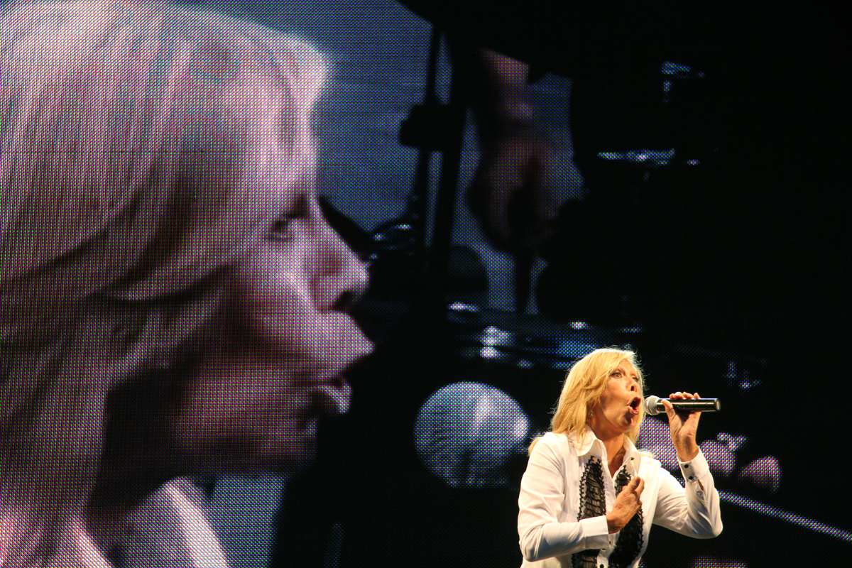 Amelita Baltar Interpretó la famosa ¨Balada para un loco¨, entre otros temas. ( Foto: Estrella Herrera)